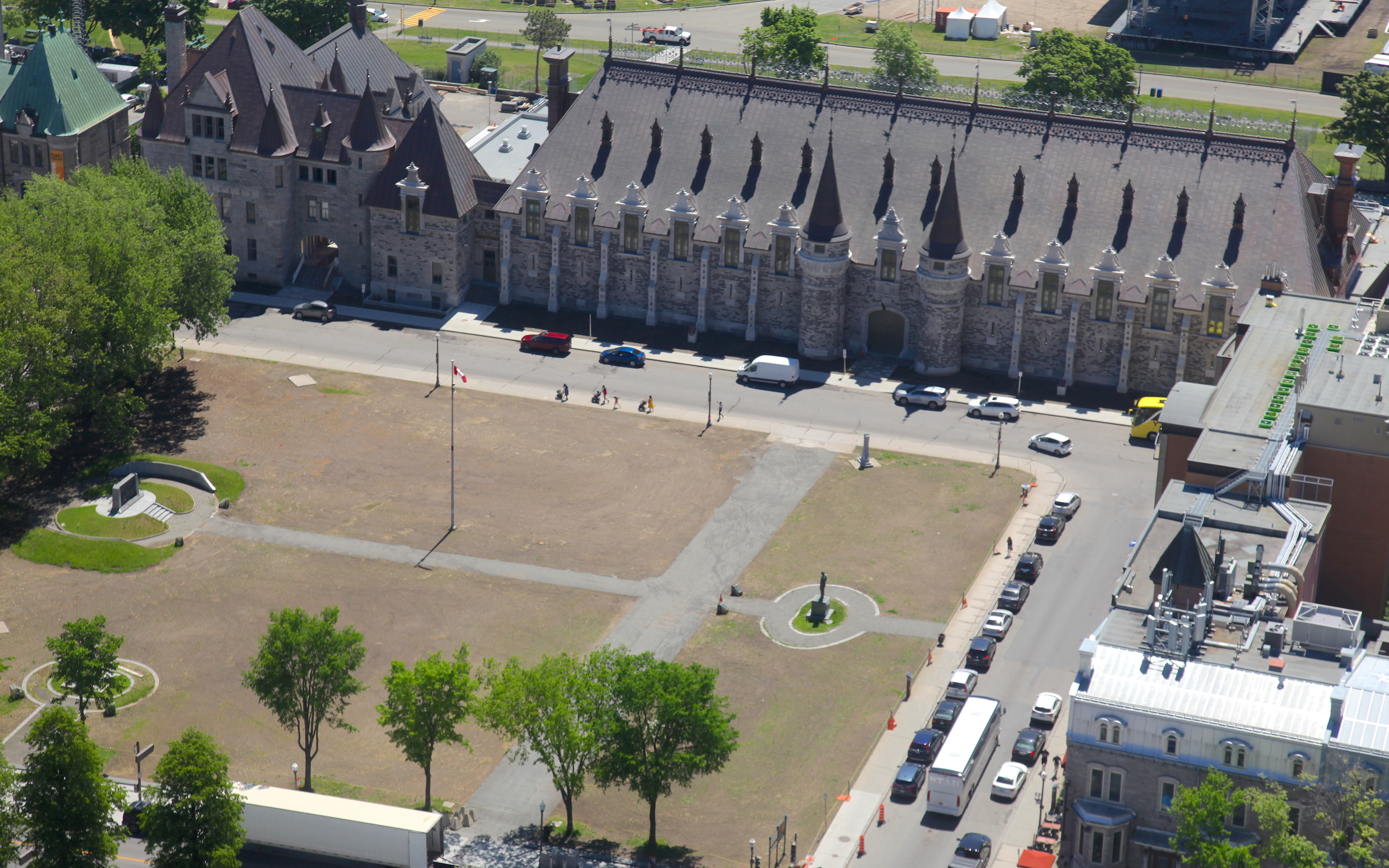 Le Manège militaire Voltigeurs de Québec est un vaste bâtiment de style château dans la Ville de Québec. Construit à partir de 1885 sur des plans de l'architecte Eugène-Étienne Taché juste à l’extérieur des murs de la vieille ville, en bordure des plaines d’Abraham, le manège domine le terrain d’exercice d’origine avec lequel il a un lien indissociable. La conception fantaisiste du bâtiment, avec son haut toit pentu, ses murs de pierre et ses tourelles à pinacle, en a fait un véritable symbole de l’architecture canadienne. Le manège est détruit par un incendie durant la nuit du 4 au 5 avril 2008. Le premier ministre Stephen Harper a annoncé le 16 novembre 2012 que le manège serait reconstruit et environ 100 millions de dollars seront investis entre 2012 et 2015 pour les travaux.